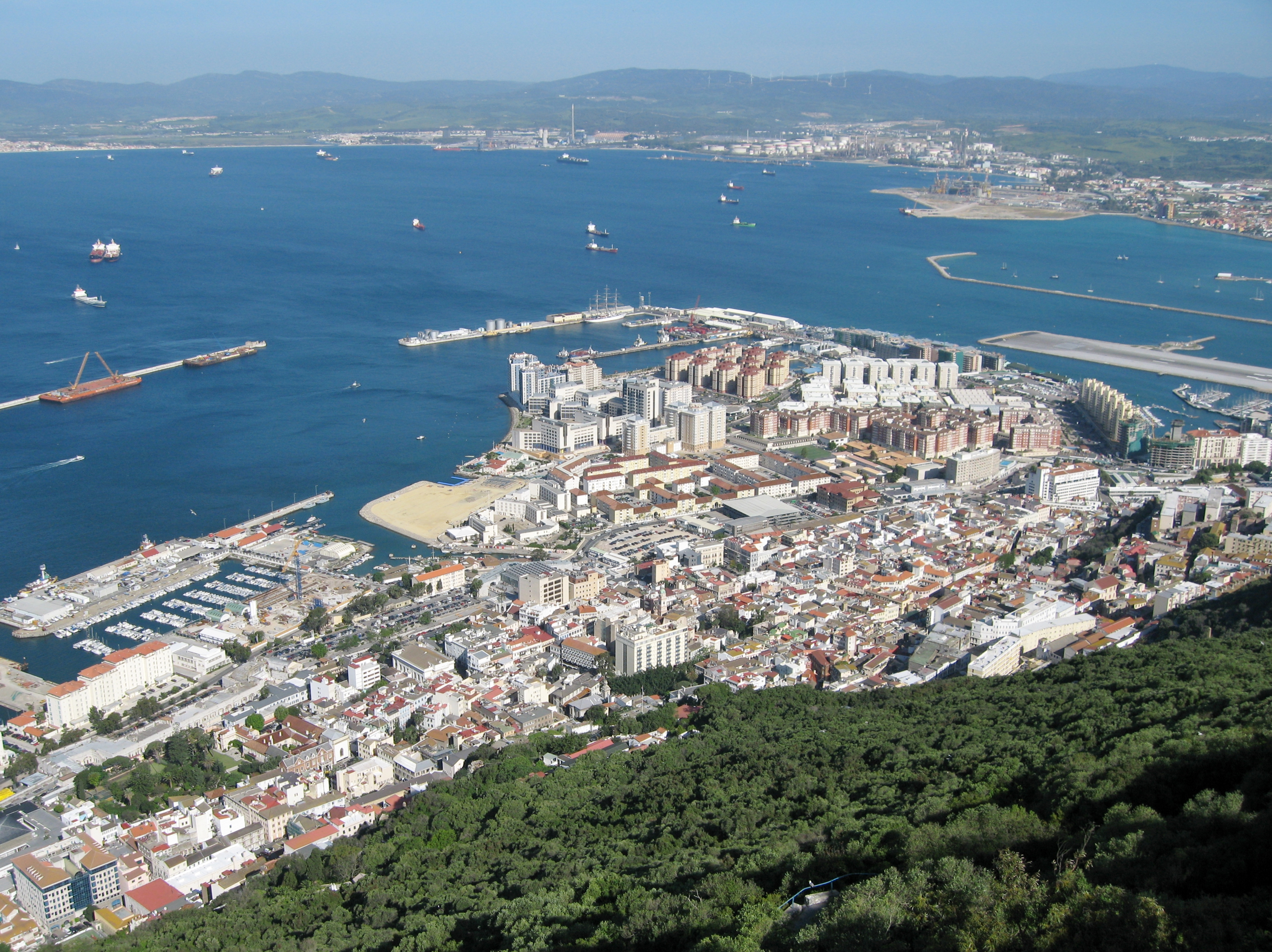 Gibraltar, Bahía de Algeciras, Blick auf den Hafen von Gibraltar